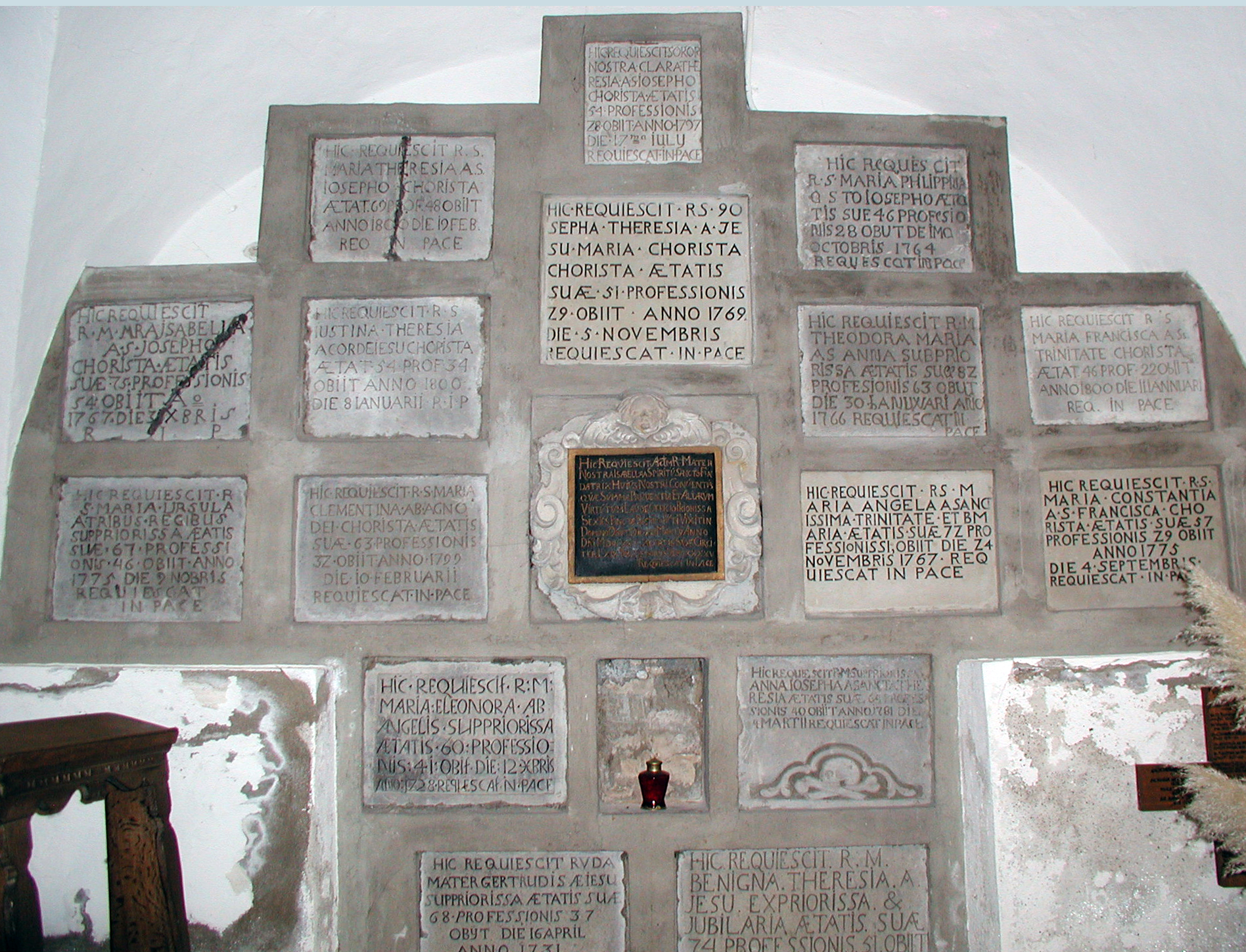 St. Maria vom Frieden, Köln